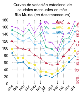 Curvas de variación estacional del río Murta en desembocadura. # Ministerio de Obras Públicas (Chile) , Dirección General de Aguas # Informe técnico N° 5: Reserva del río Murta para la conservación ambiental y el desarrollo de la cuenca. # Santiago de Chile, 2009 # Ministerio de Obras Públicas (Chile) # url: # Tabla 6. Caudales (m3/s) según Probabilidad de Excedencia. pág.31 mes 5% 10% 20% 50% 85% 95% ene 162 152 141 121 99 88 feb 158 144 128 102 74 60 mar 147 135 121 98 73 61 abr 172 152 130 95 60 45 may 144 128 110 81 53 40 jun 170 143 115 71 35 21 jul 119 104 86 59 34 24 ago 116 99 81 52 27 18 sep 95 85 74 55 36 27 oct 140 125 107 79 51 39 nov 141 130 118 96 74 62 dic 177 164 148 120 92 77 This plot was created with Gnuplot.